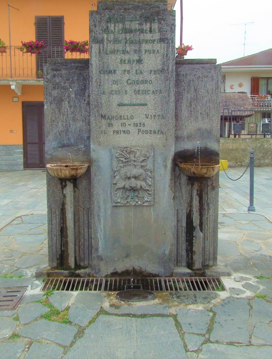 Il monumento ai caduti di Mandello Vitta è posizionato nella piazza del paese. Dal monumento sgorga acqua rendendolo una fontana.